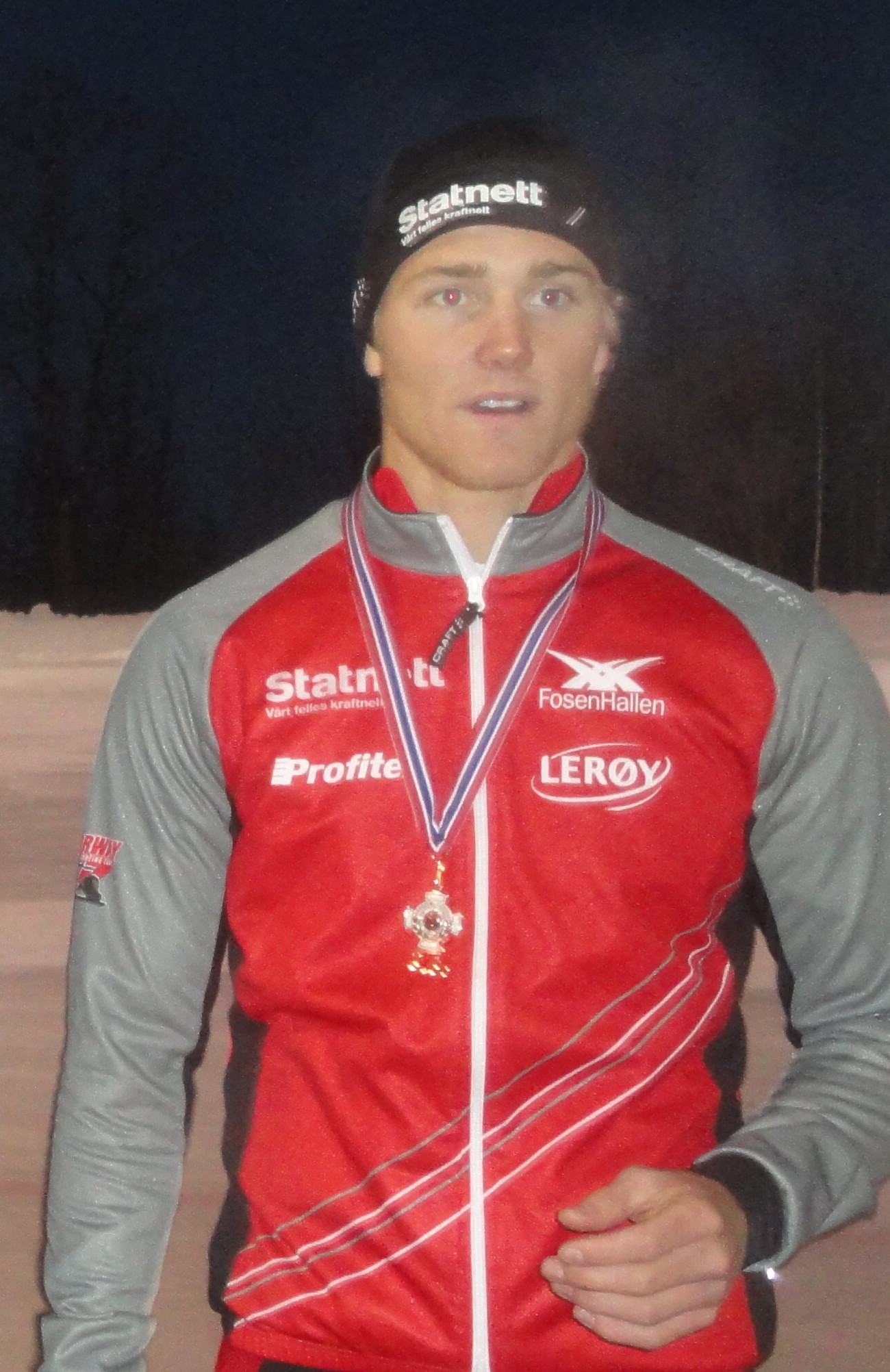 Christoffer Fagerli Rukke med bronsemedalje i Sprint-NM 2012 i Asker